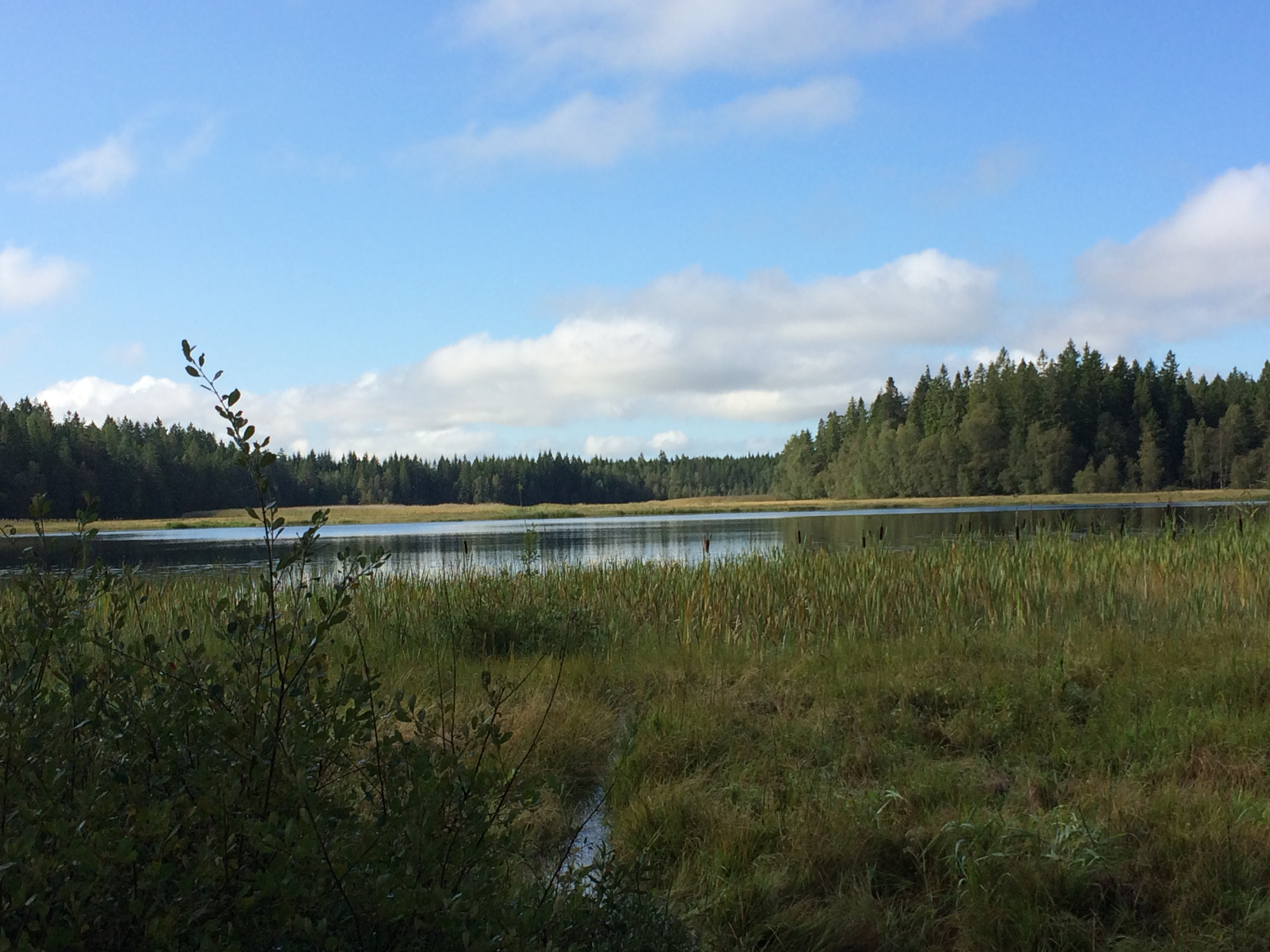 Ekelundssjön, Hunneberg